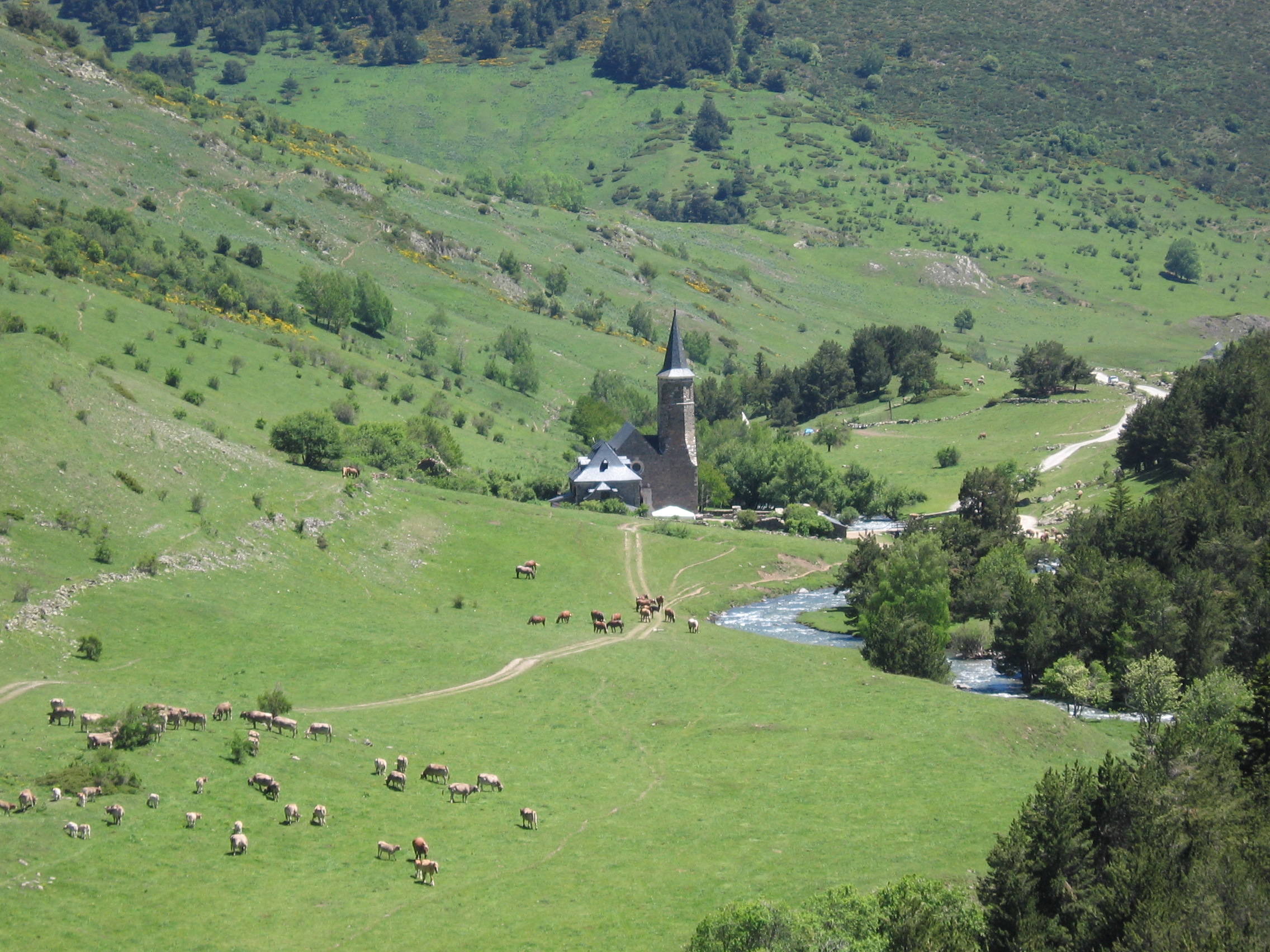 Montgarri